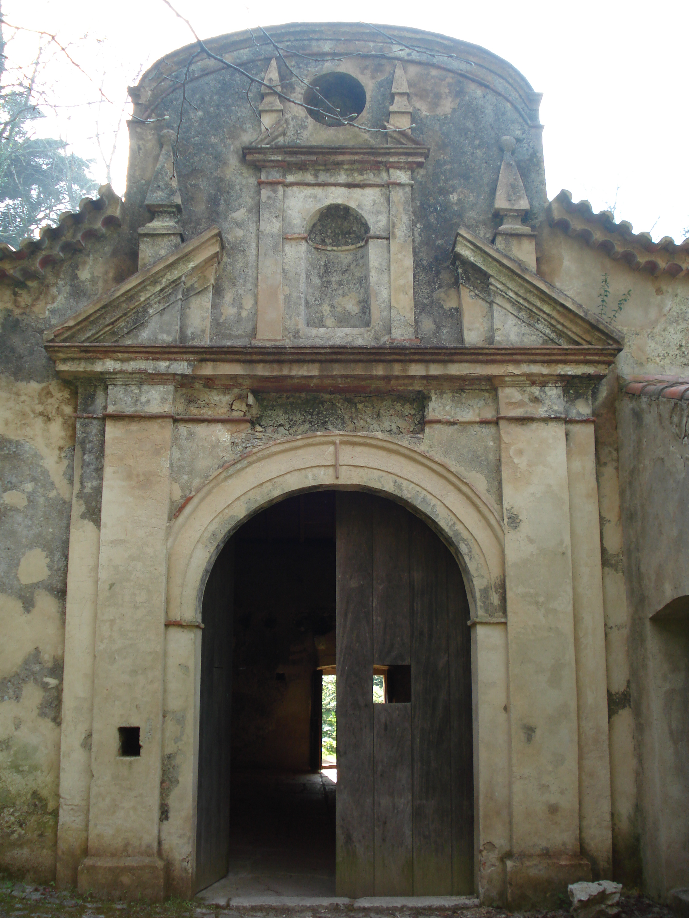 Real Fábrica de Gelo da Serra de Montejunto situada na Serra de Montejunto, Concelho de Cadaval.